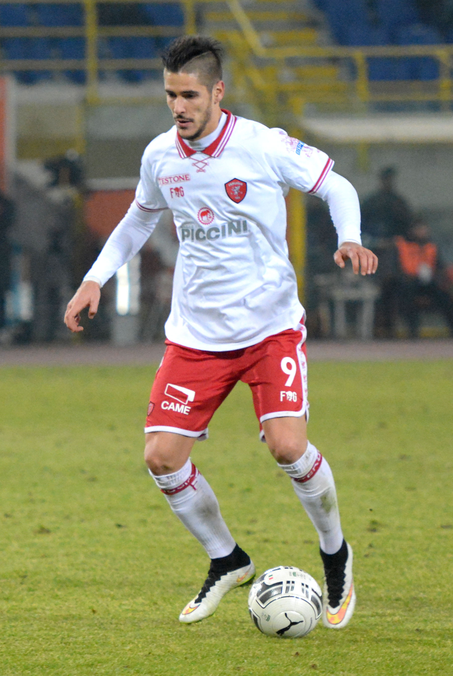 Diego Falcinelli, calciatore italiano, in azione con la maglia del Perugia.